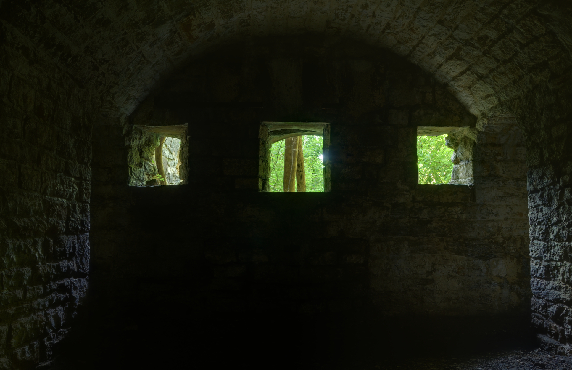 Coffre de contrescarpe Sud-Ouest. Basses perches fortifications.